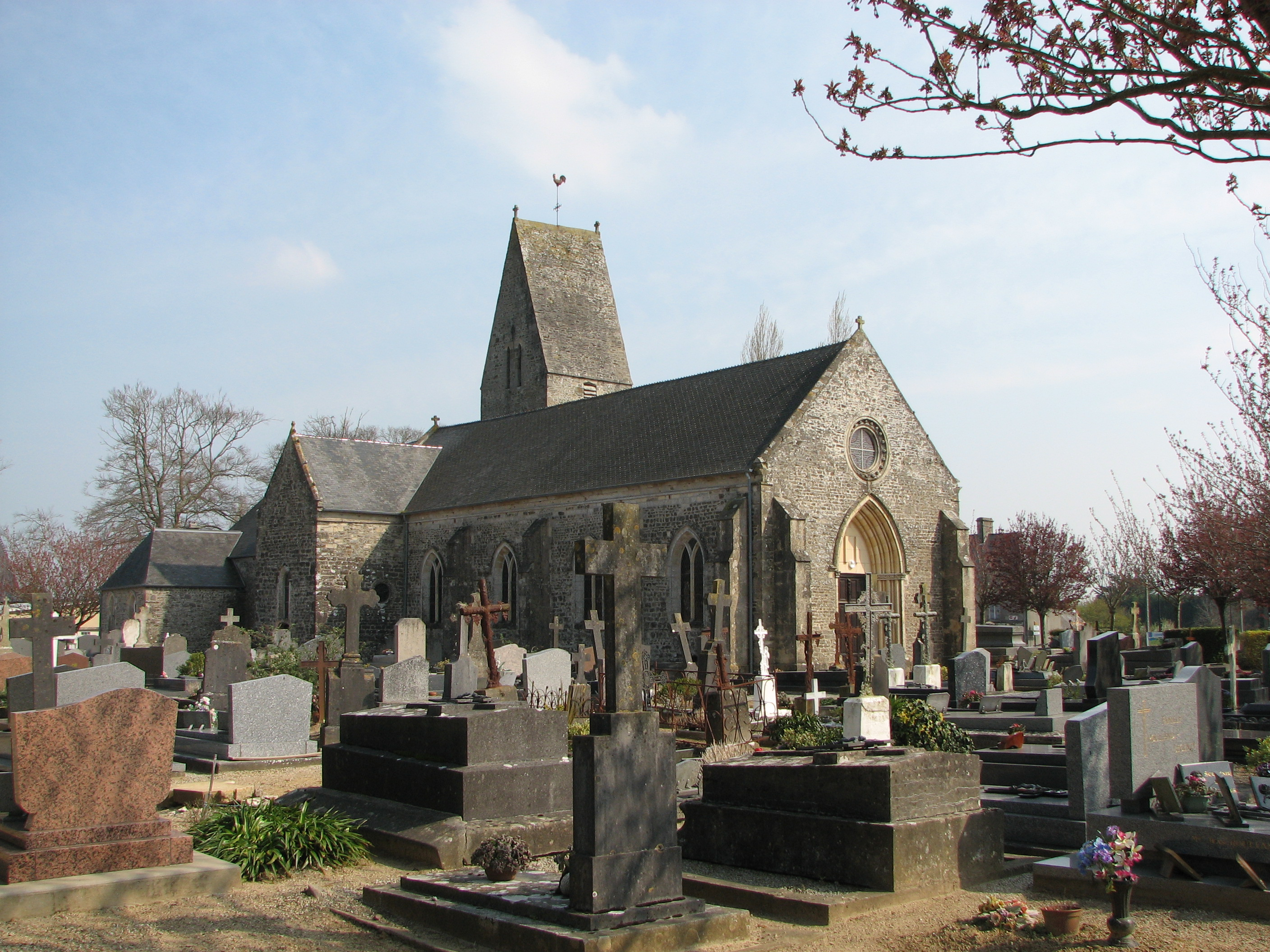 Eglise de Denneville, Manche, NormandieDenneville churche, Normandy